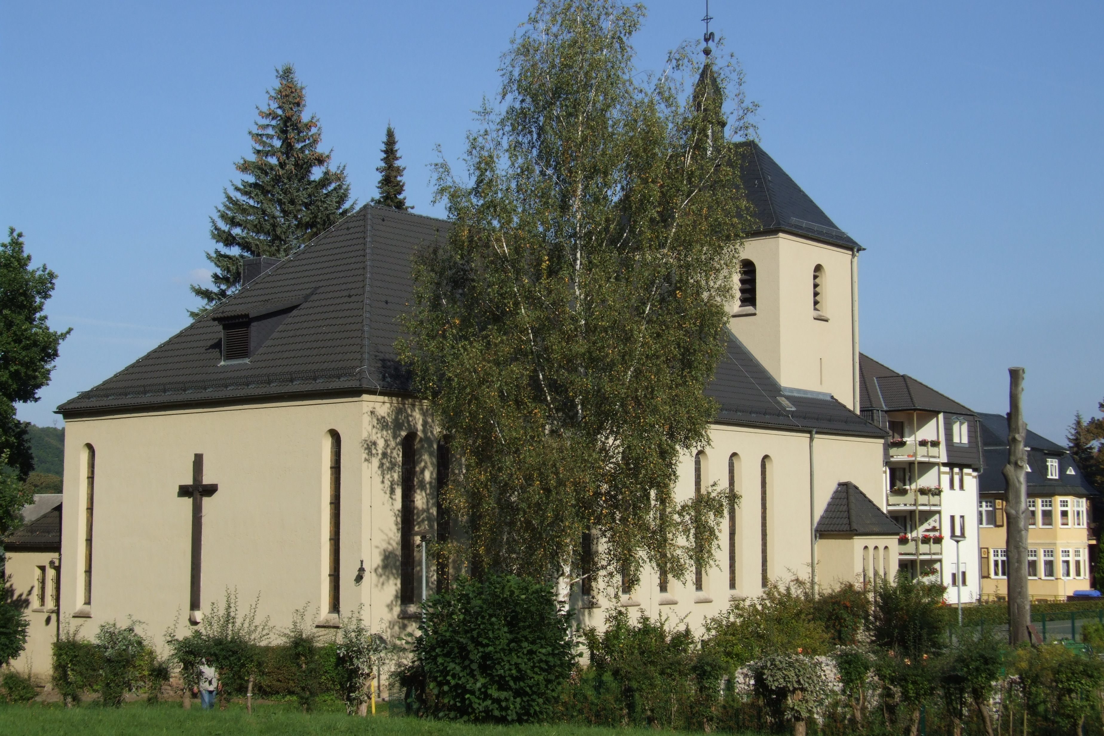 Kath. Kirche Bad Blankenburg in Thüringen